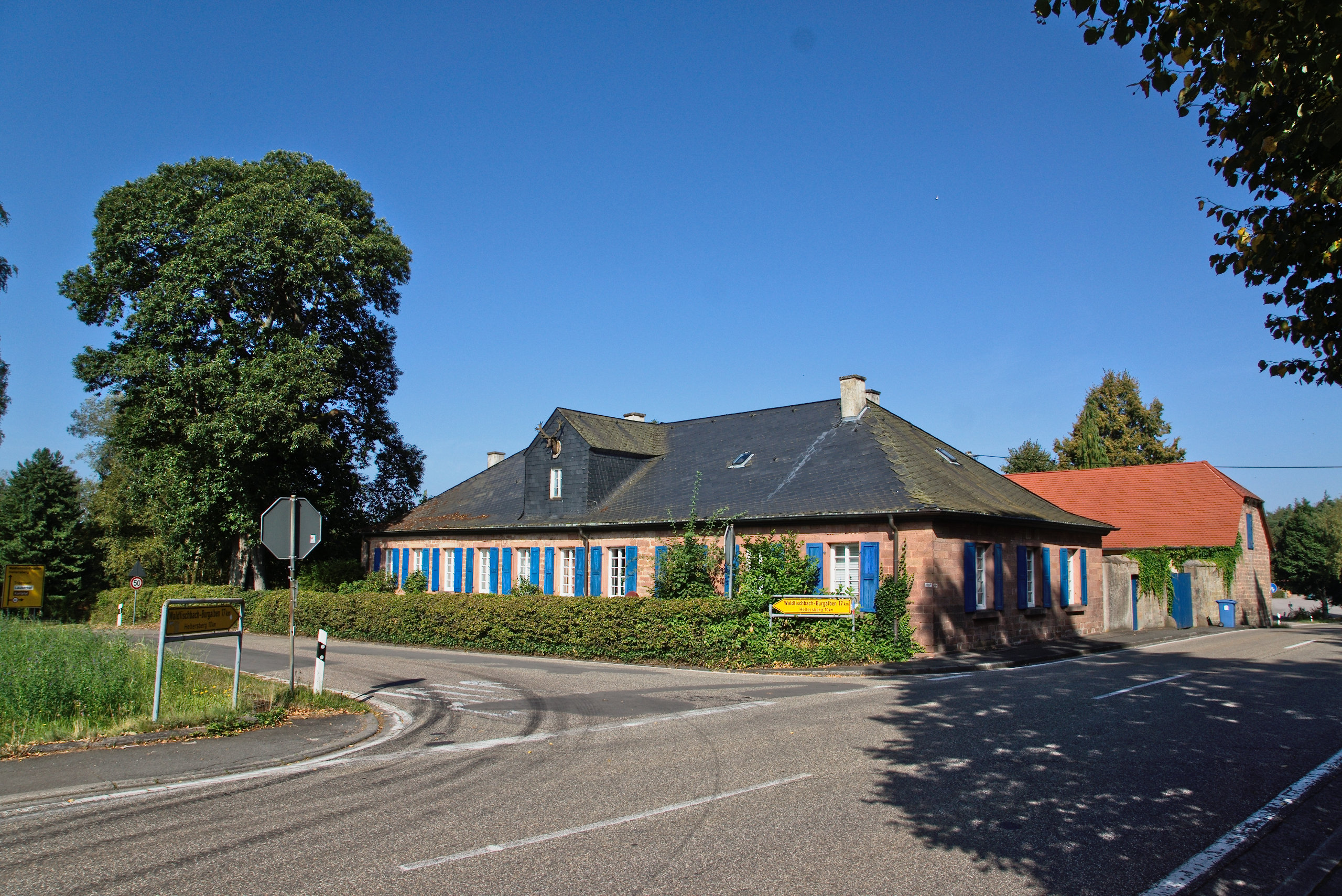 Altes Forsthausgebäude Johanniskreuz